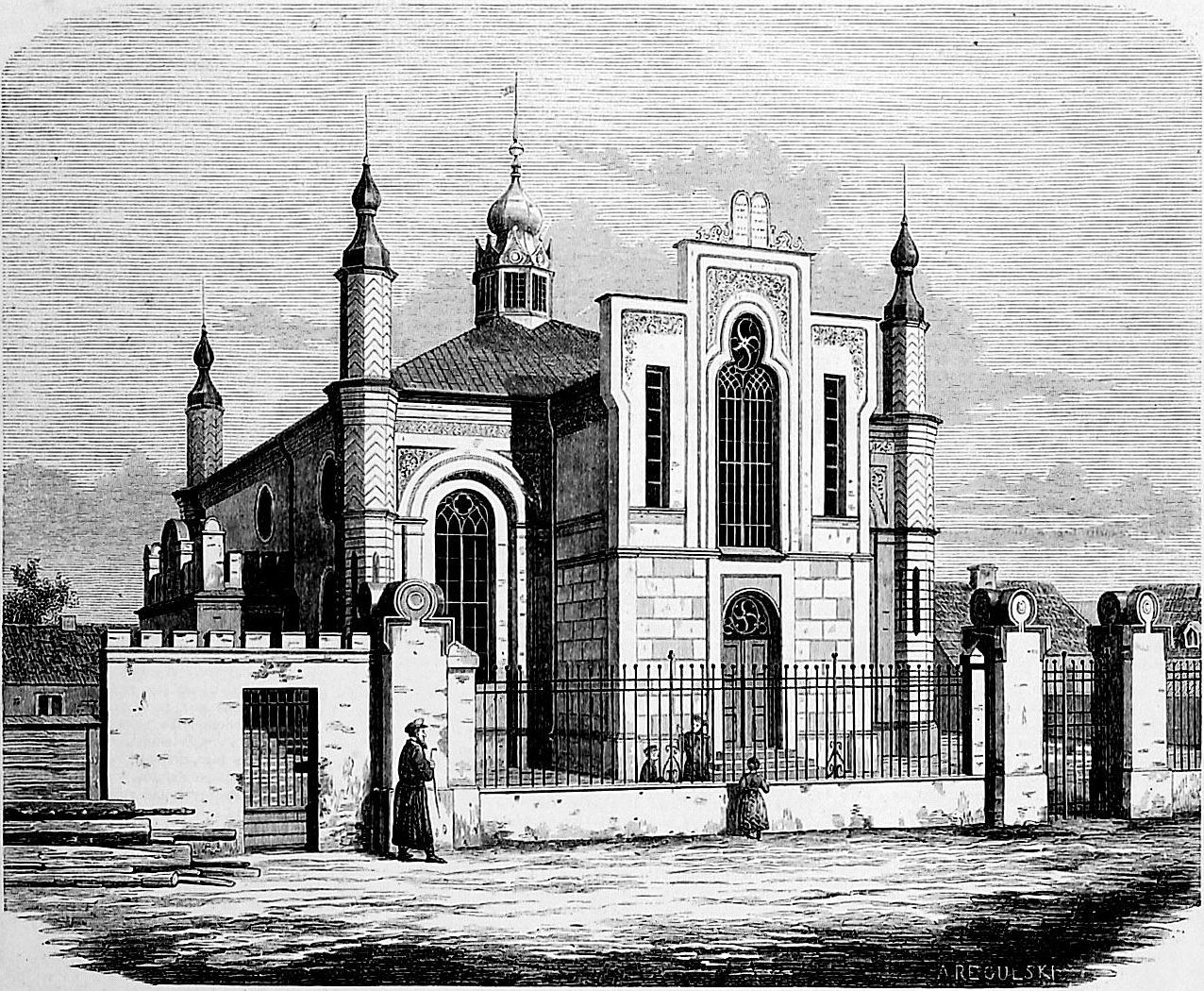 Stara Wielka Synagoga we Włocławku - opis [1], ukończona 1854, pod nadzorem Henryka Bocka i Markusa Leszczyńskiego